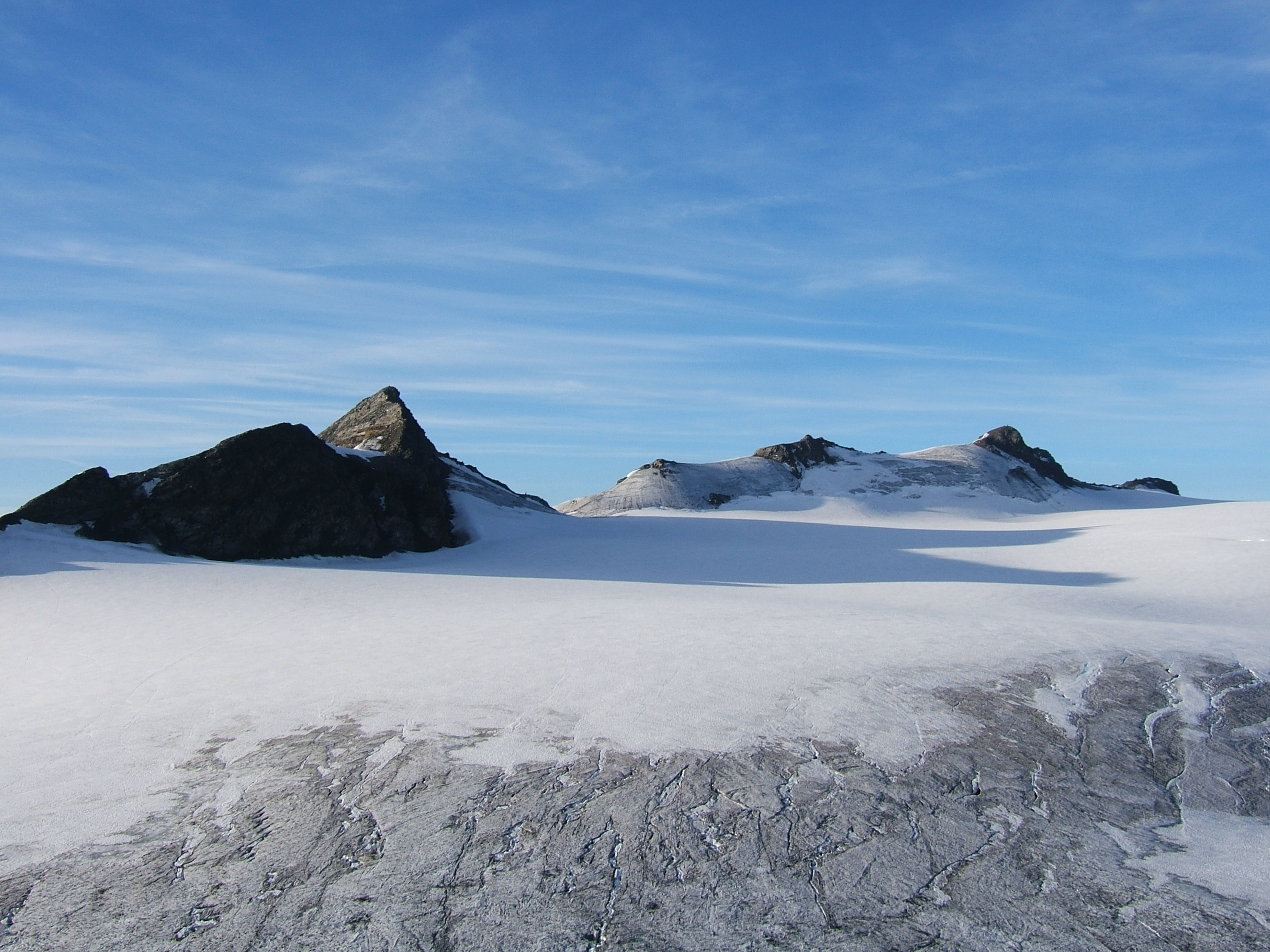 Hintereisspitzen von Norden, vom Brandenburger Haus